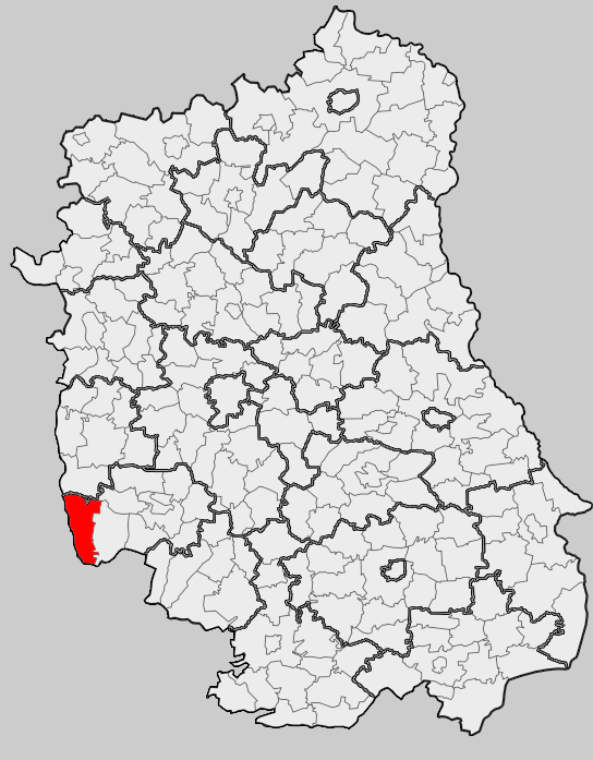 Map of gmina Annopol, Kraśnik county, Lublin voivodship Mapa gminy Annopol, powiat kraśnicki, województwo lubelskie